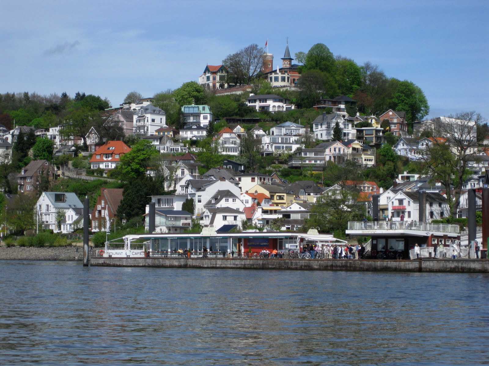 Hamburg-Blankenese, Blick auf den Süllberg, aufgenommen von einer HADAG-Fähre